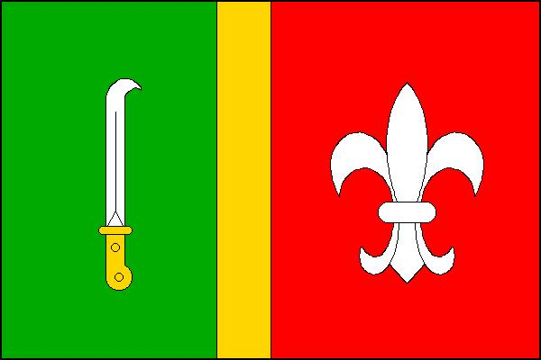 Vlajka obce Kobylnice